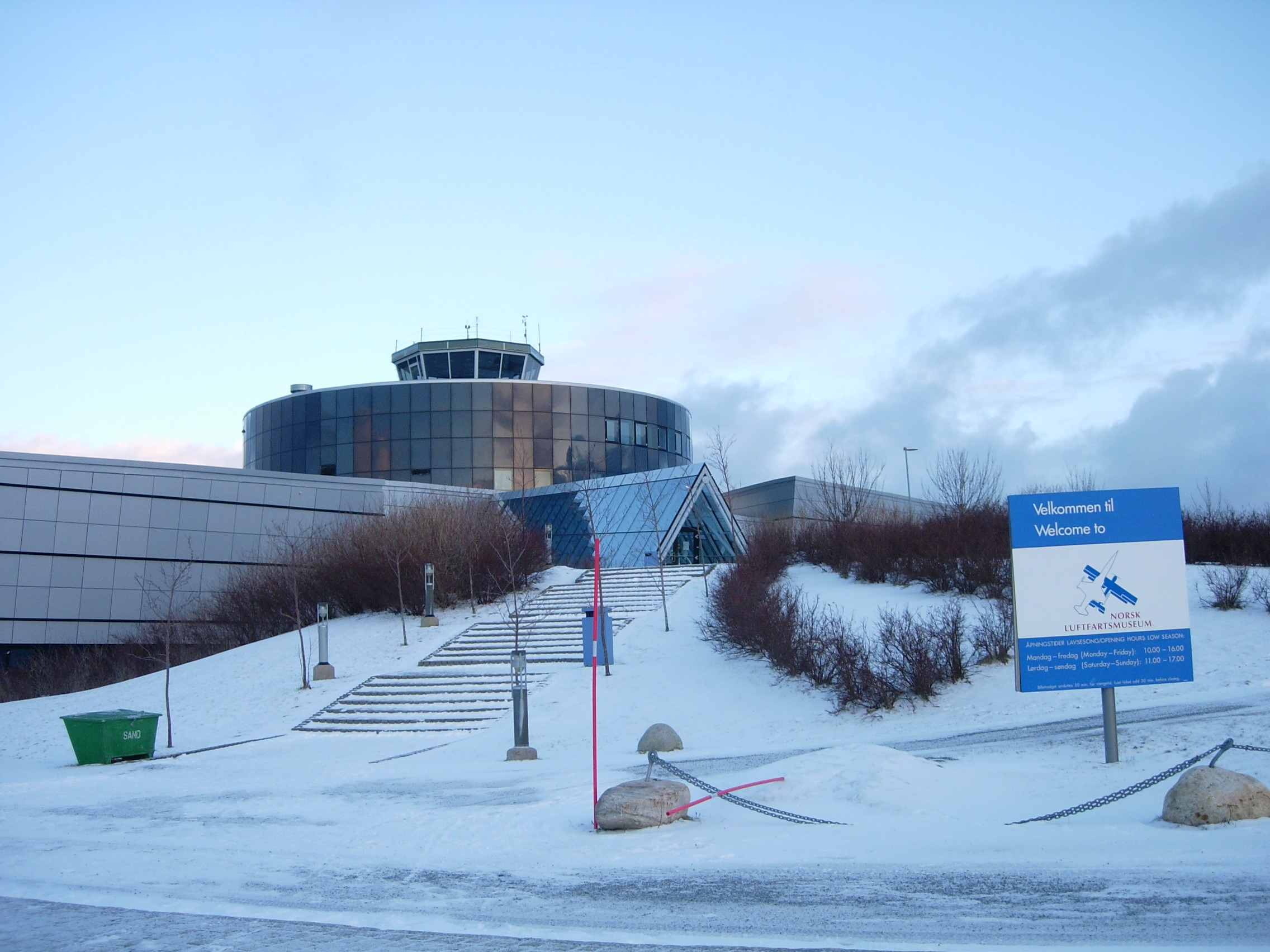 Norwegian aviation museum, Norsk luftfartsmuseum, Norsk Luftforsvarsmuseum